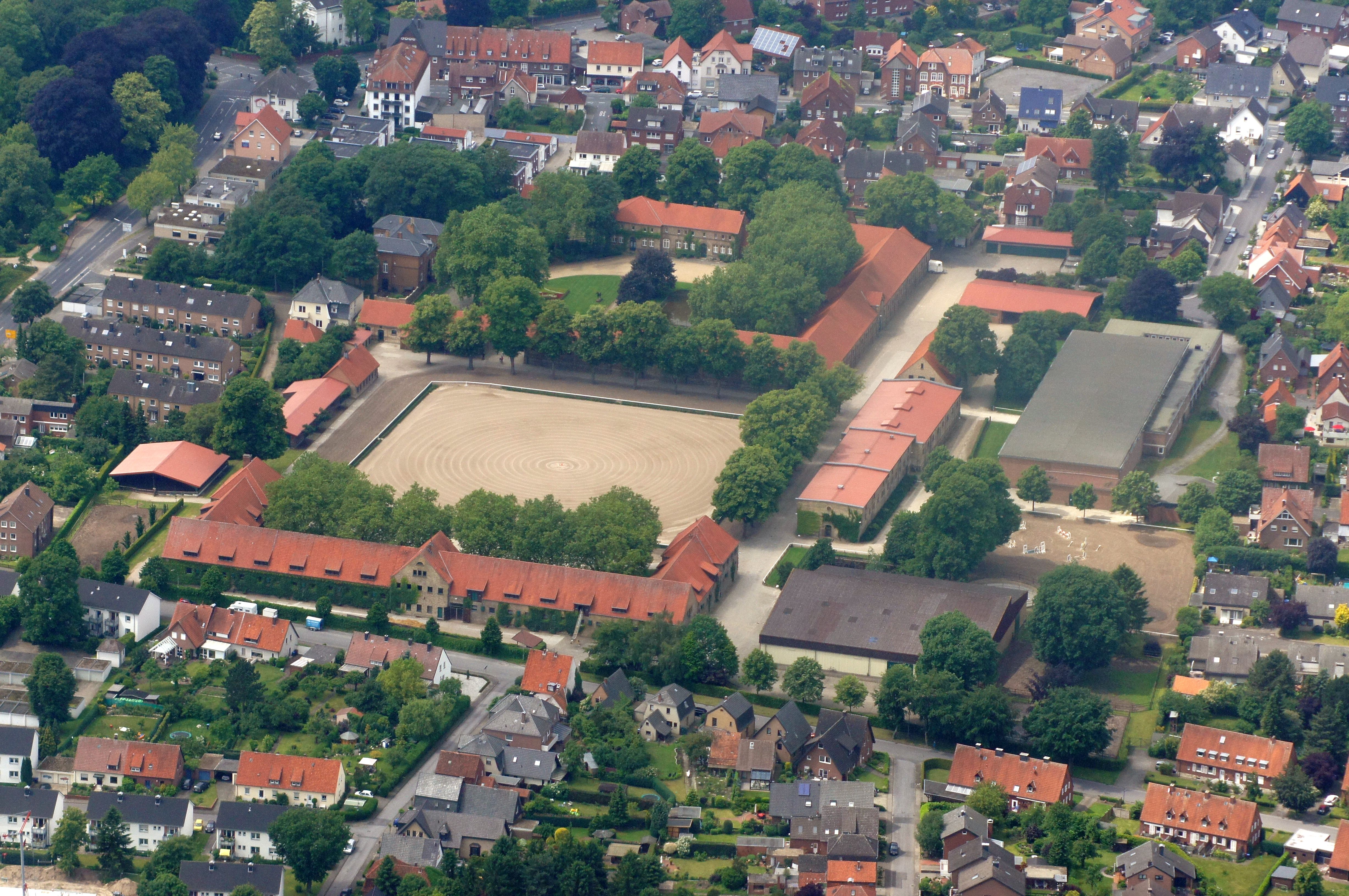 Das Nordrhein-Westfälische Landgestüt in Warendorf, Nordrhein-Westfalen, Deutschland. Die Aufnahme entstand während des Münsterland-Fotoflugs am 1. Juni 2014. Hinweis: Die Aufnahme wurde aus dem Flugzeug durch eine Glasscheibe hindurch fotografiert.